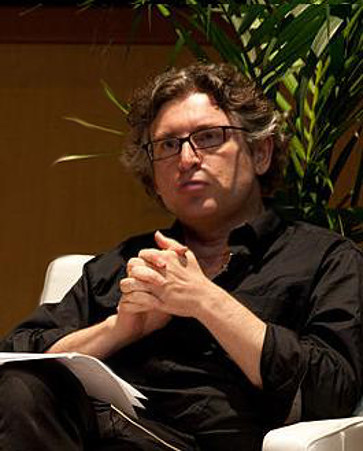 Debate realizado en el espacio de Voces Mapfre, dedicado a la reflexión y a la filosofía, con Michel Onfray como invitado